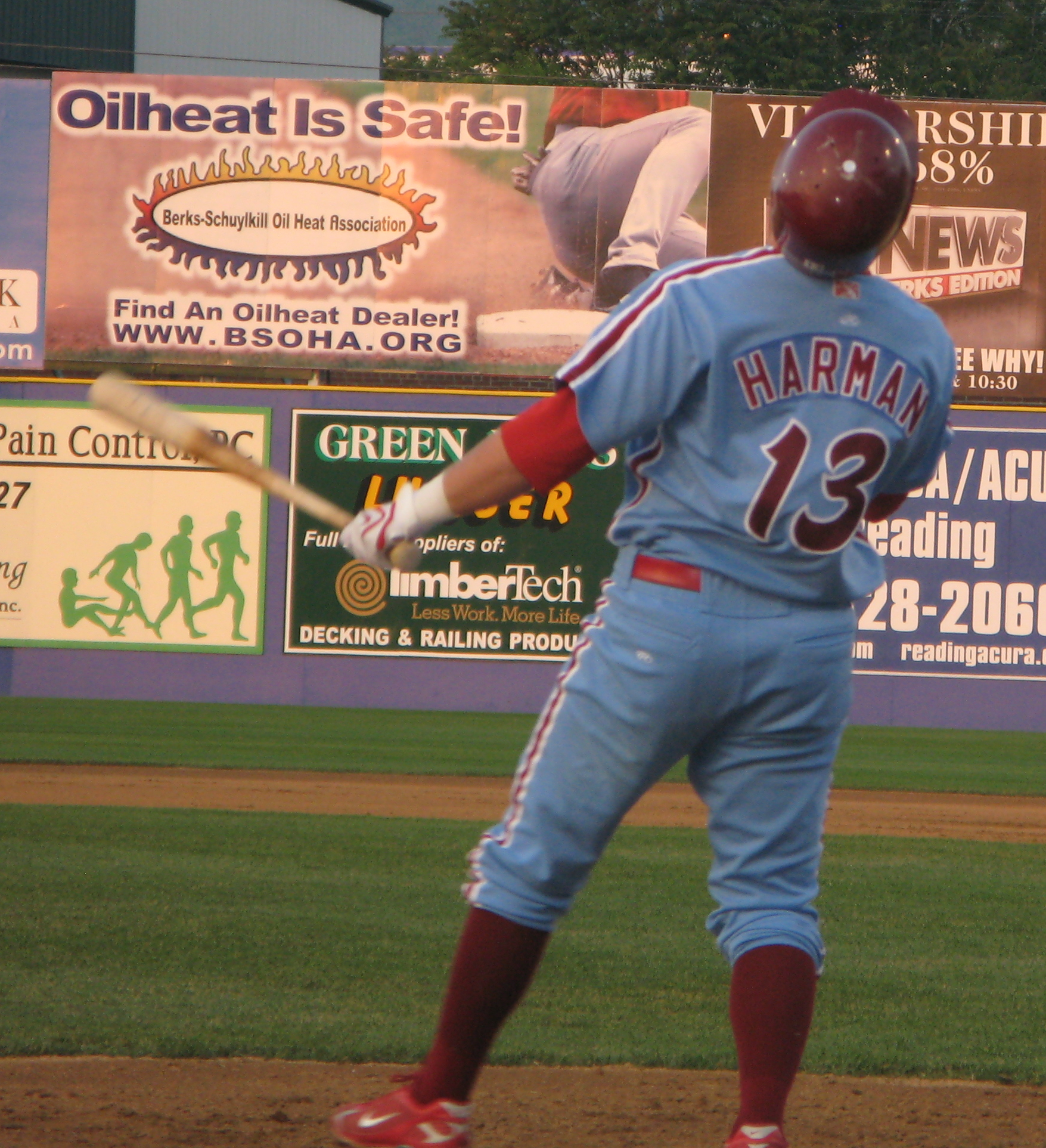 Brad Harman